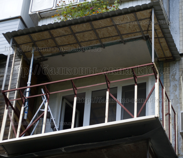 Винос балкону по підлозі